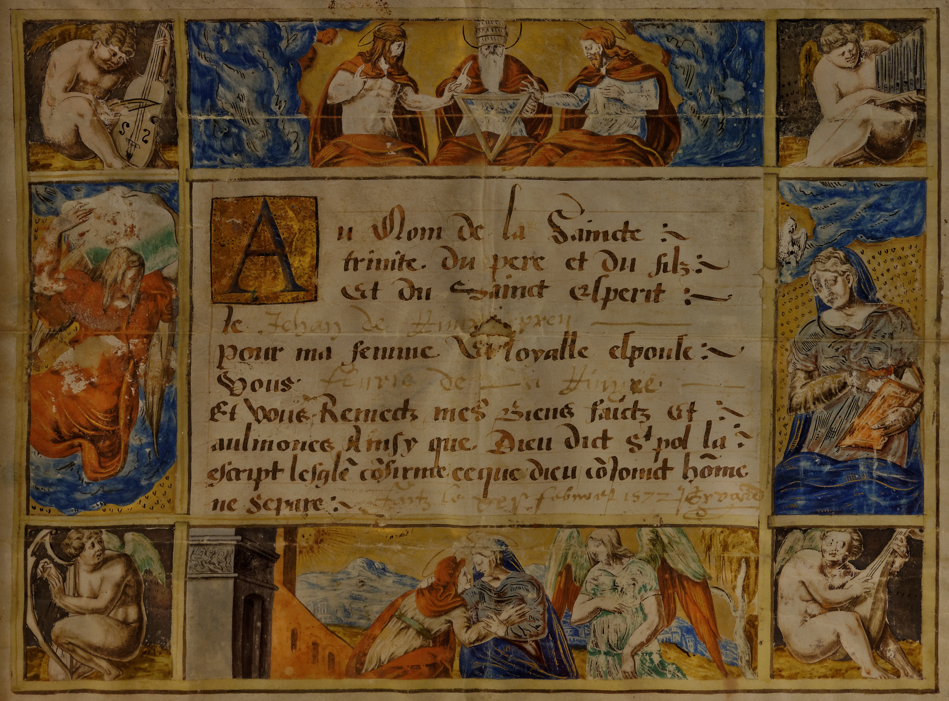 Charte de mariage de Jehan de Rivery et Fluvie de la Rivyre - 1572 Enluminure sur parchemin. Lyon, musée Gadagne, Inv. 37.65 Exposition : Lyon Renaissance. Arts et humanisme.